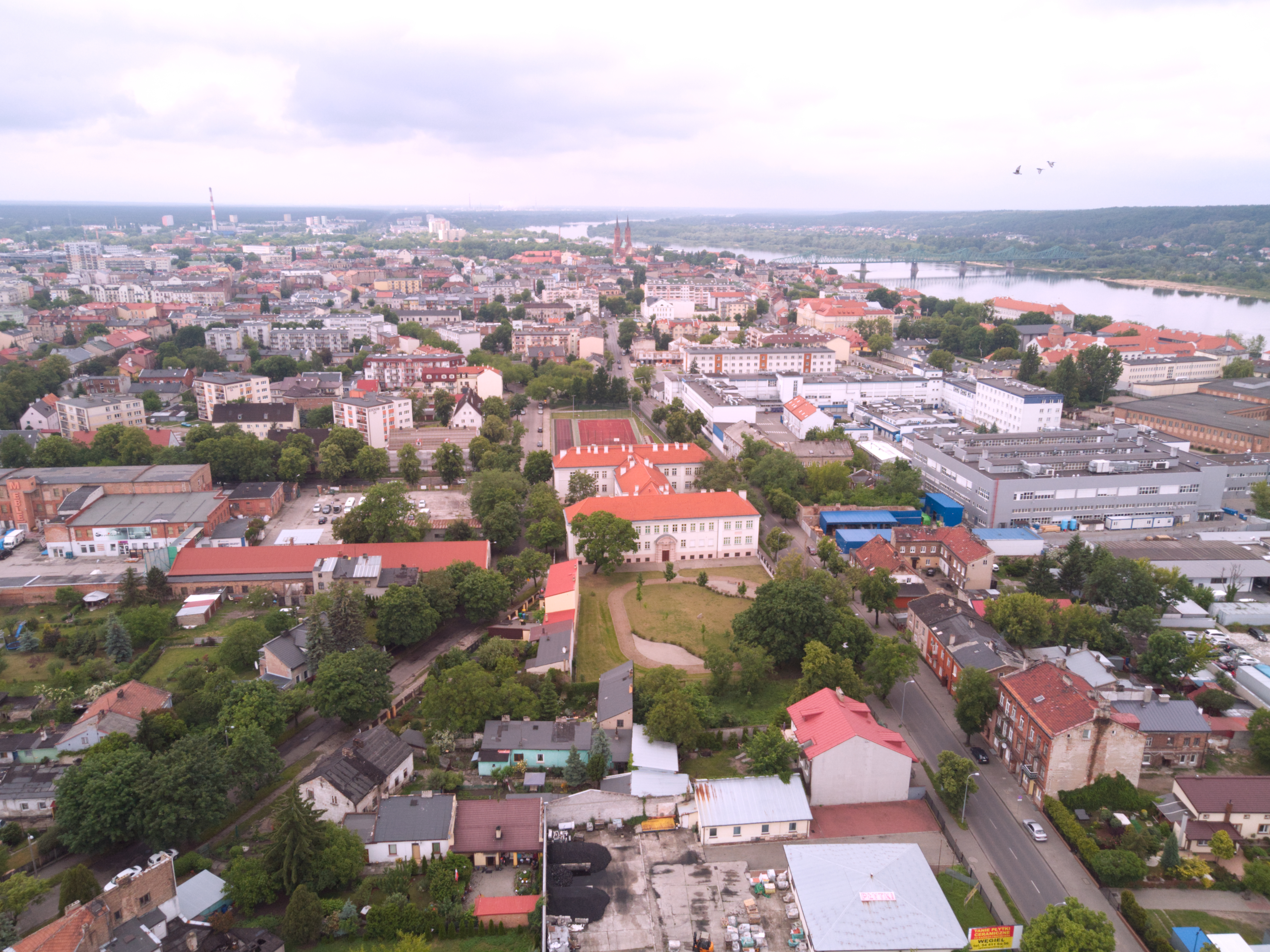 Śródmieście (2020 r.)